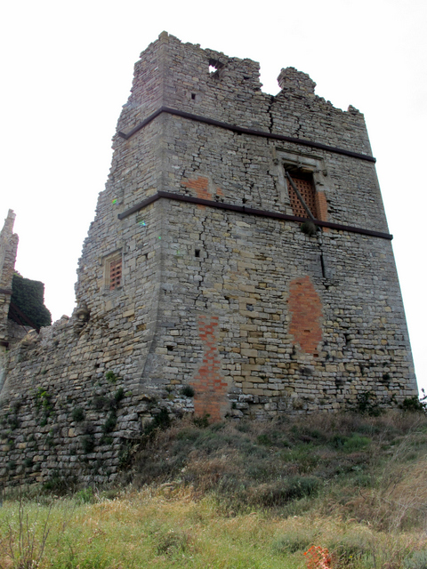 Castell Savallà a la Conca de Barberà - Catalunya